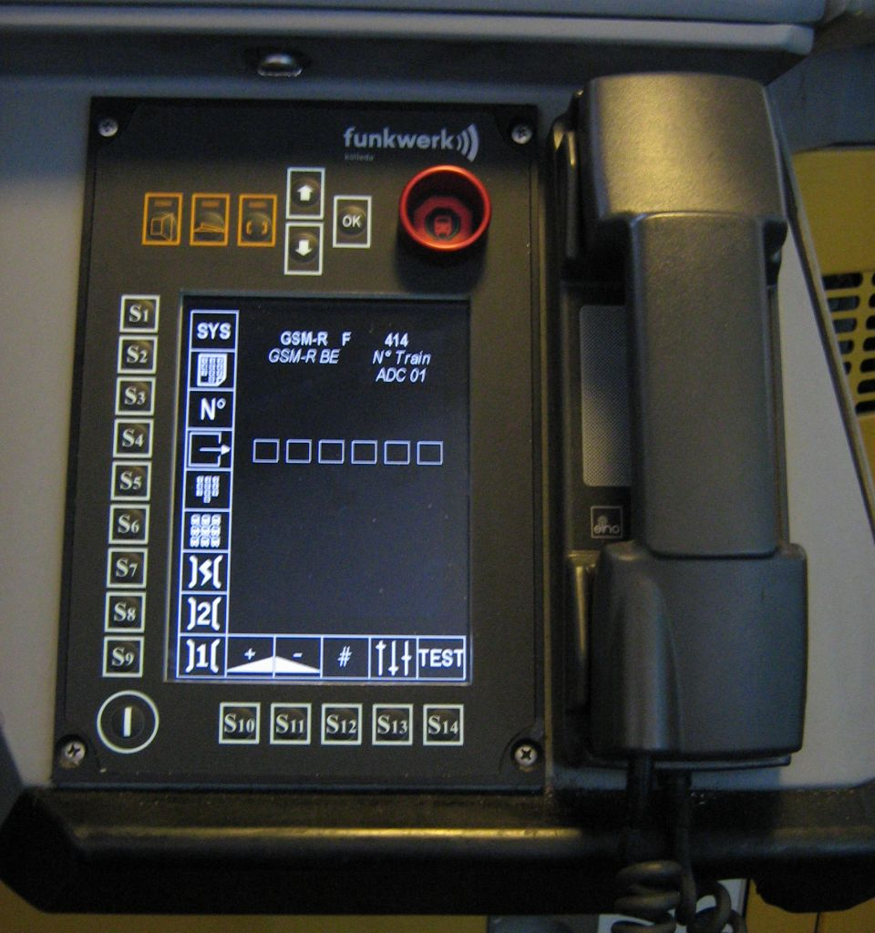 Appareil GSM-R employé par la SNCF, par la SNCB et sera probablement utilisé par la RATP sur le réseau du RER